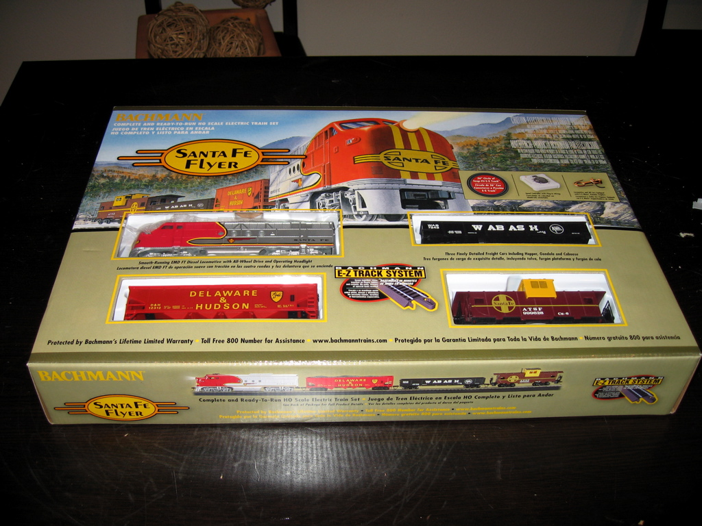 Bachmann Santa Fe Flyer